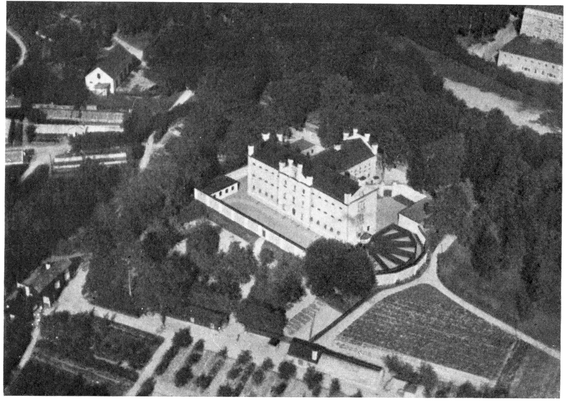 Länsfängelset i Uppsala